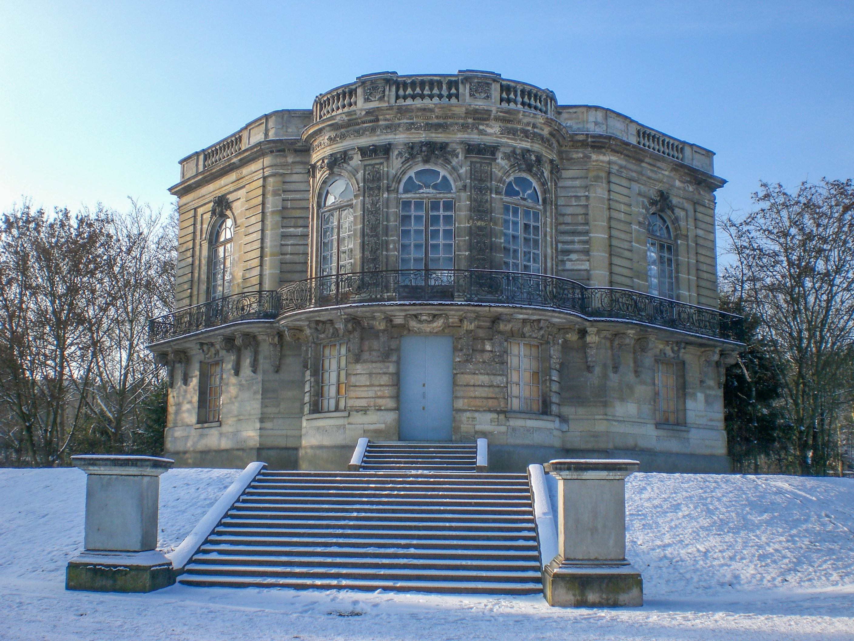 Sceaux, Parc de Le Nôtre, Pavillon de Hanovre, J.M.Chevotet, 1758-60